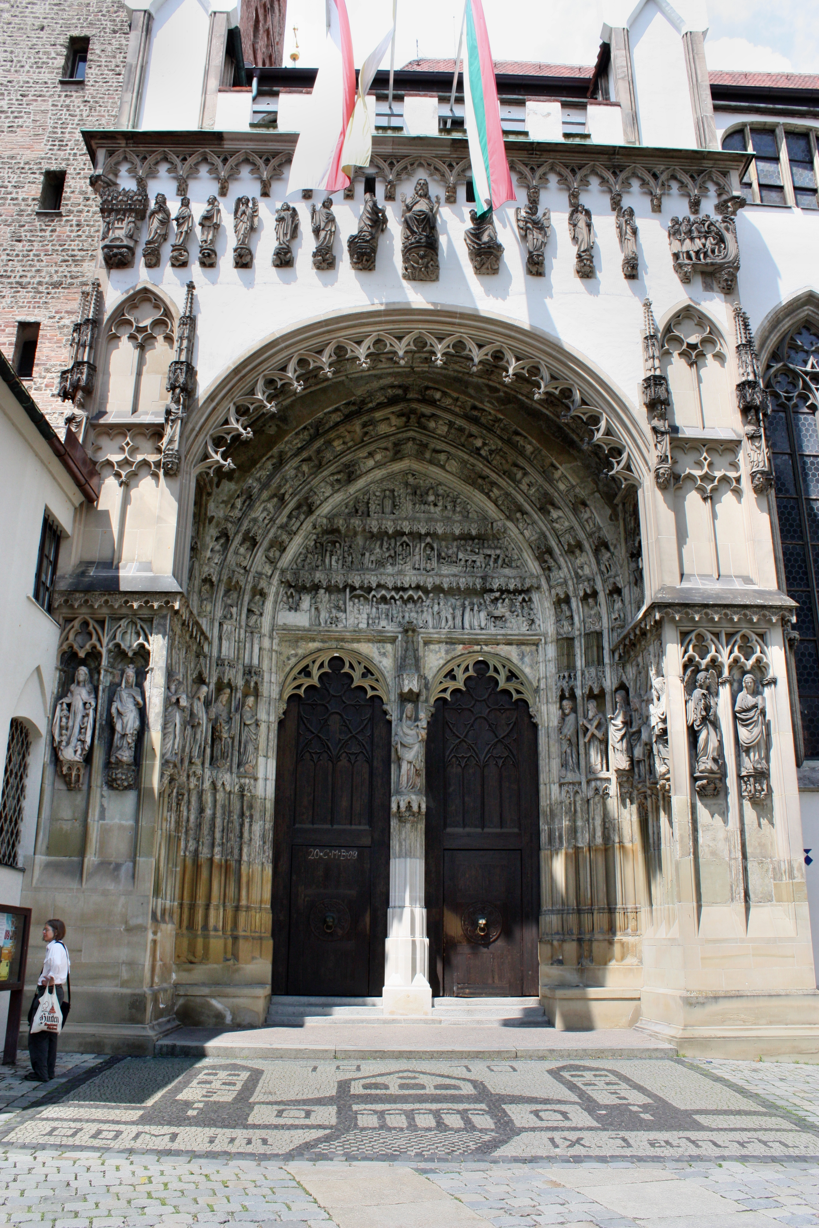 Eingangspforte zum Dom Unserer Lieben Frau, Augsburg